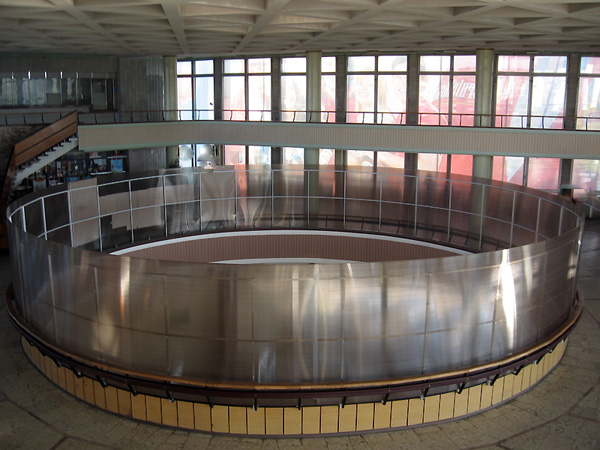 Інтер'єр Львівського автовокзалу Интерьер Львовского автовокзала